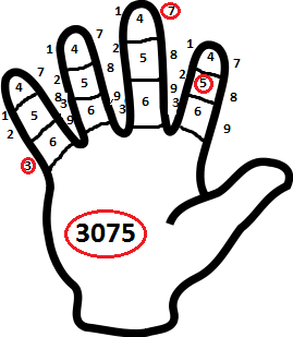 Chinese finger through the positional decimal system (with example) / Китайский пальцевый счёт позиционной десятичной системы (с примером)